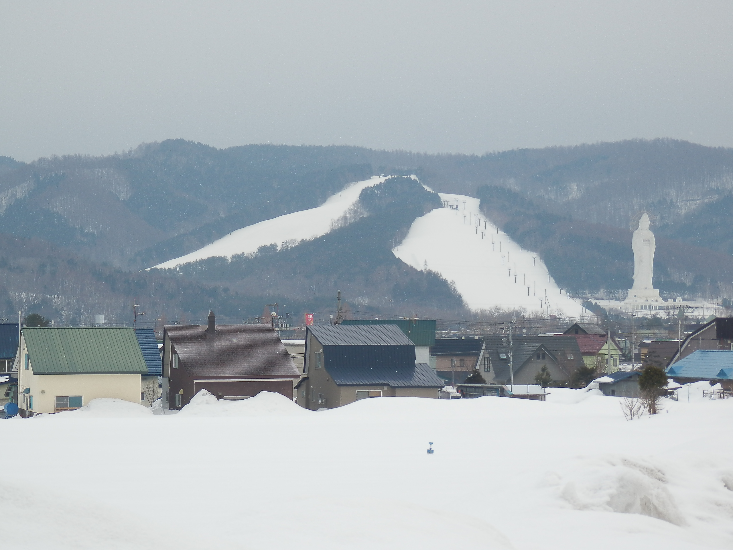 国設芦別スキー場遠景